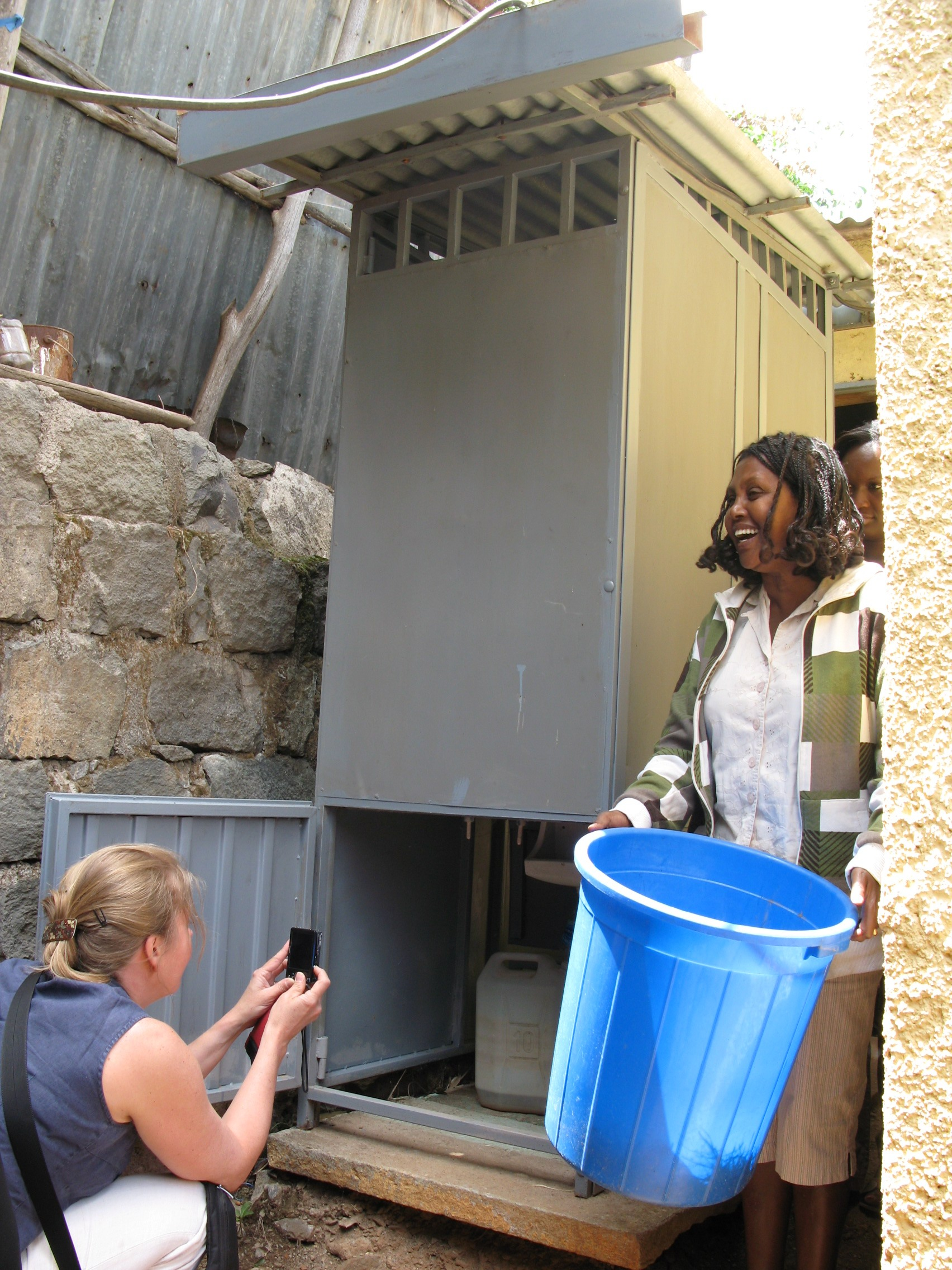 UDDT in Addis Ababa